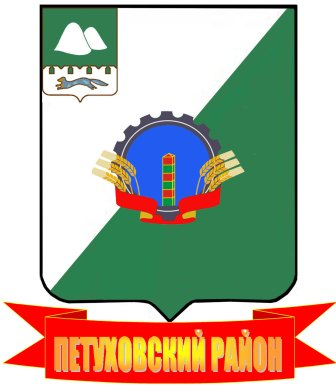 Эмблема (Герб) Петуховского района